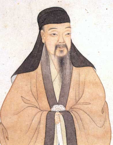 湯顯祖像/ Ancestral Picture